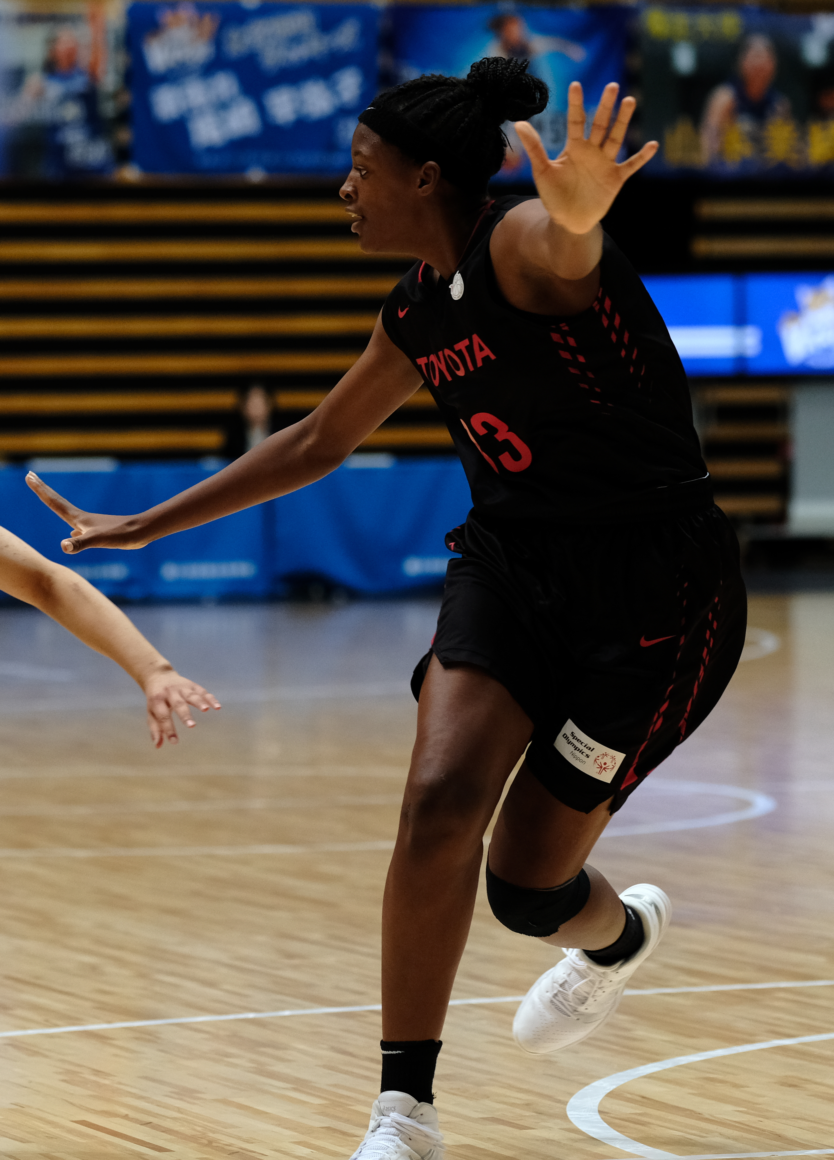 20191010＆11 東京羽田ヴィッキーズ vsトヨタアンテロープス X-T2 XF90